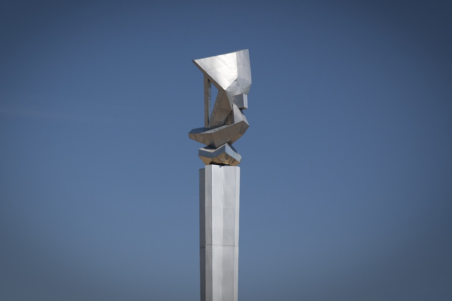 Стела "Ладья" - один из символов города Тольятти